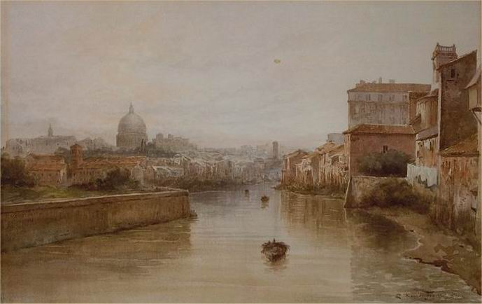 Il Tevere da Ponte Sisto (rione Regola)